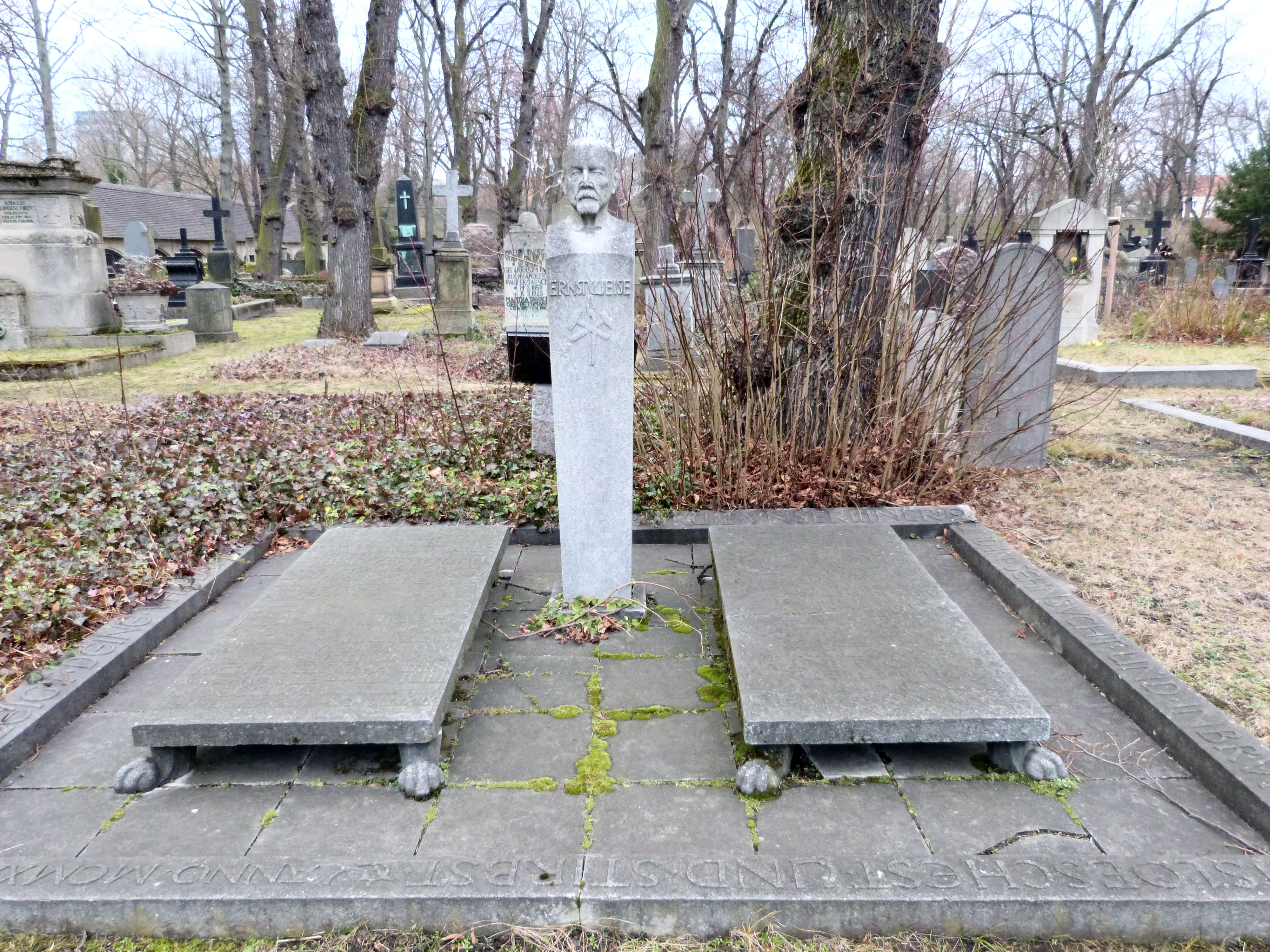 Stadtgottesacker Halle, Grab von Rudolf Ernst Weise (1844-1935), Unternehmer, Inhaber der Maschinenbaufirma Weise & Monski